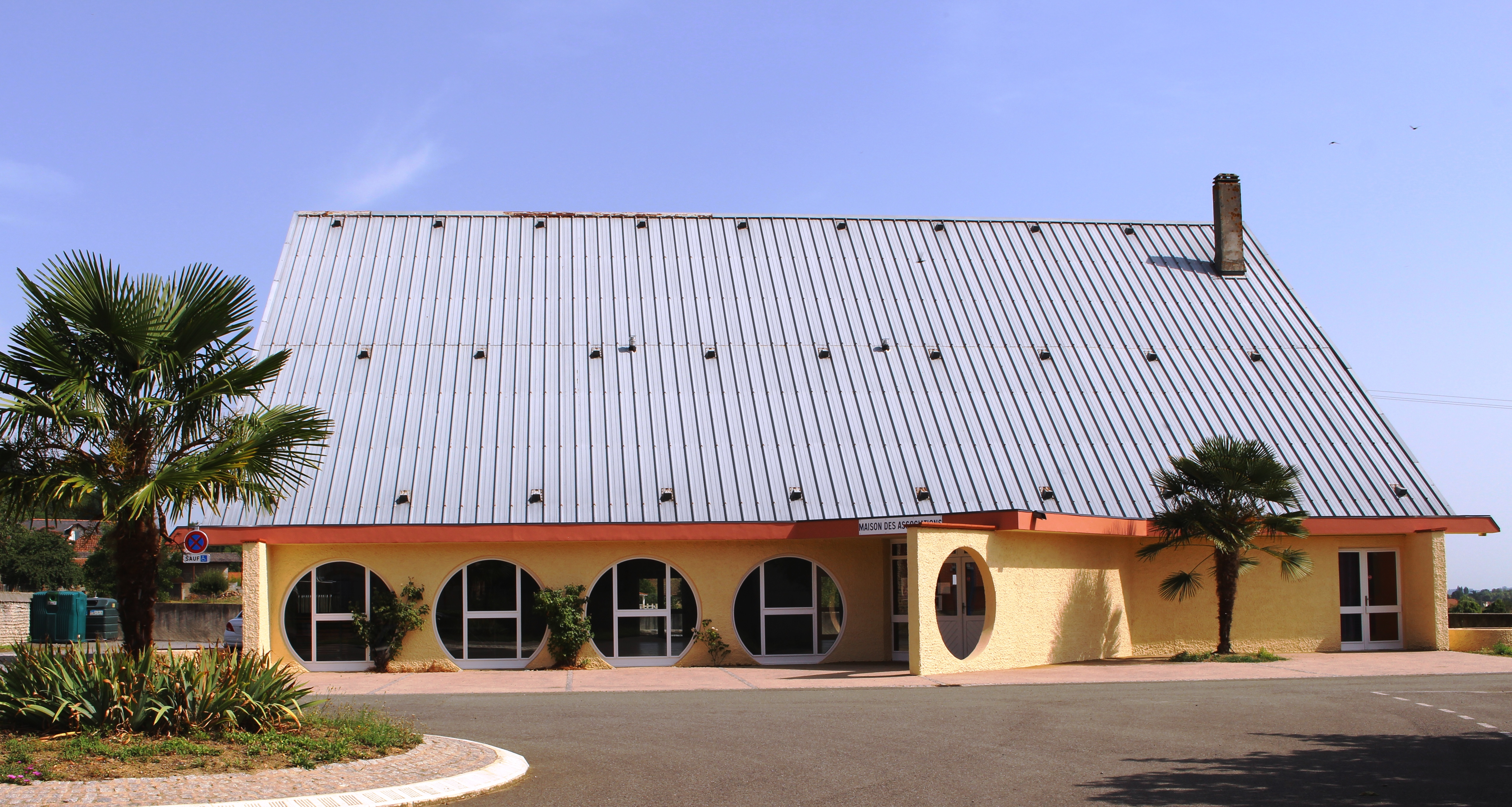 Salle des fêtes de Saint-Lézer (Hautes-Pyrénées)